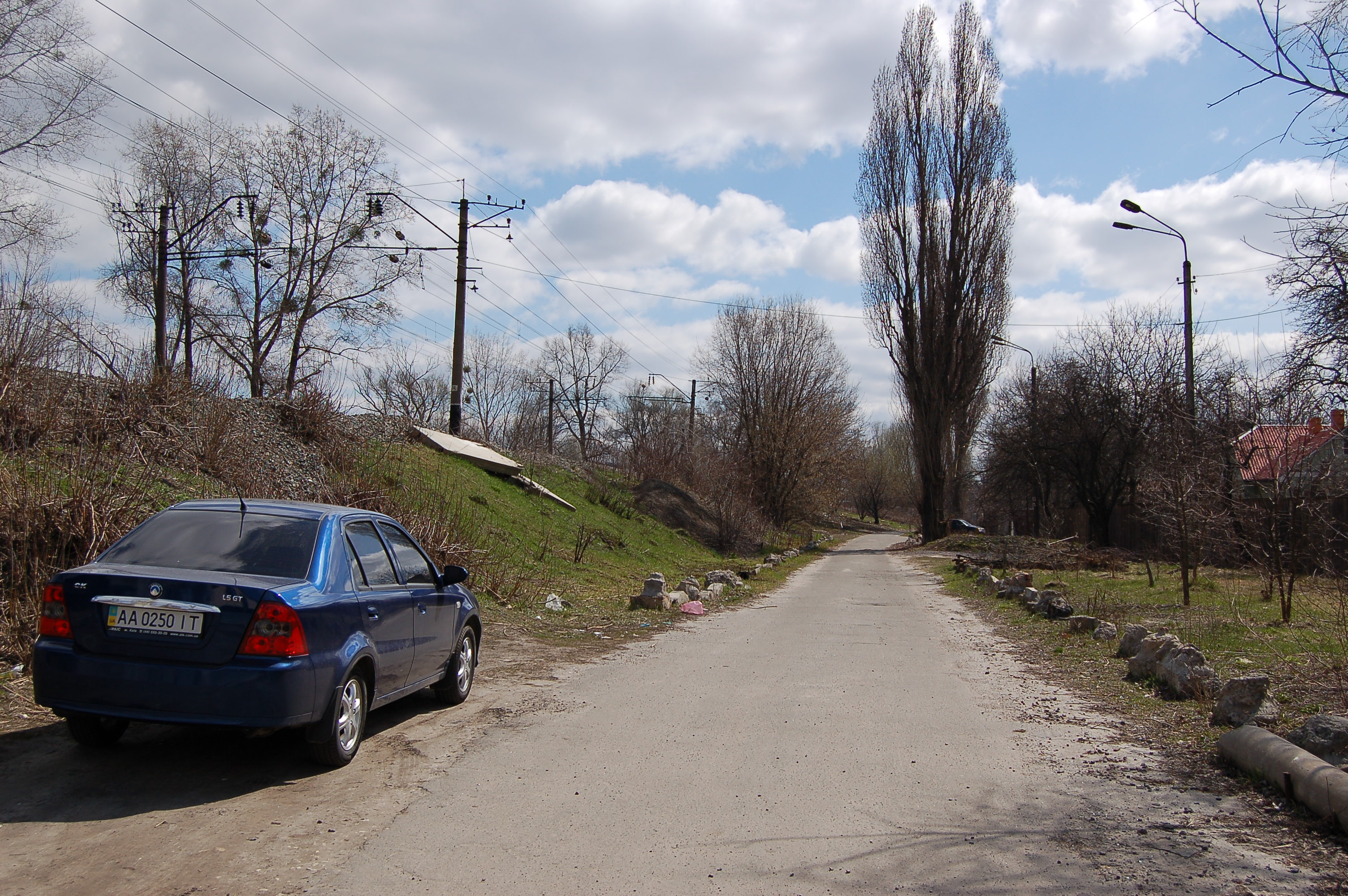 Улица Василия Степанченко в Киеве